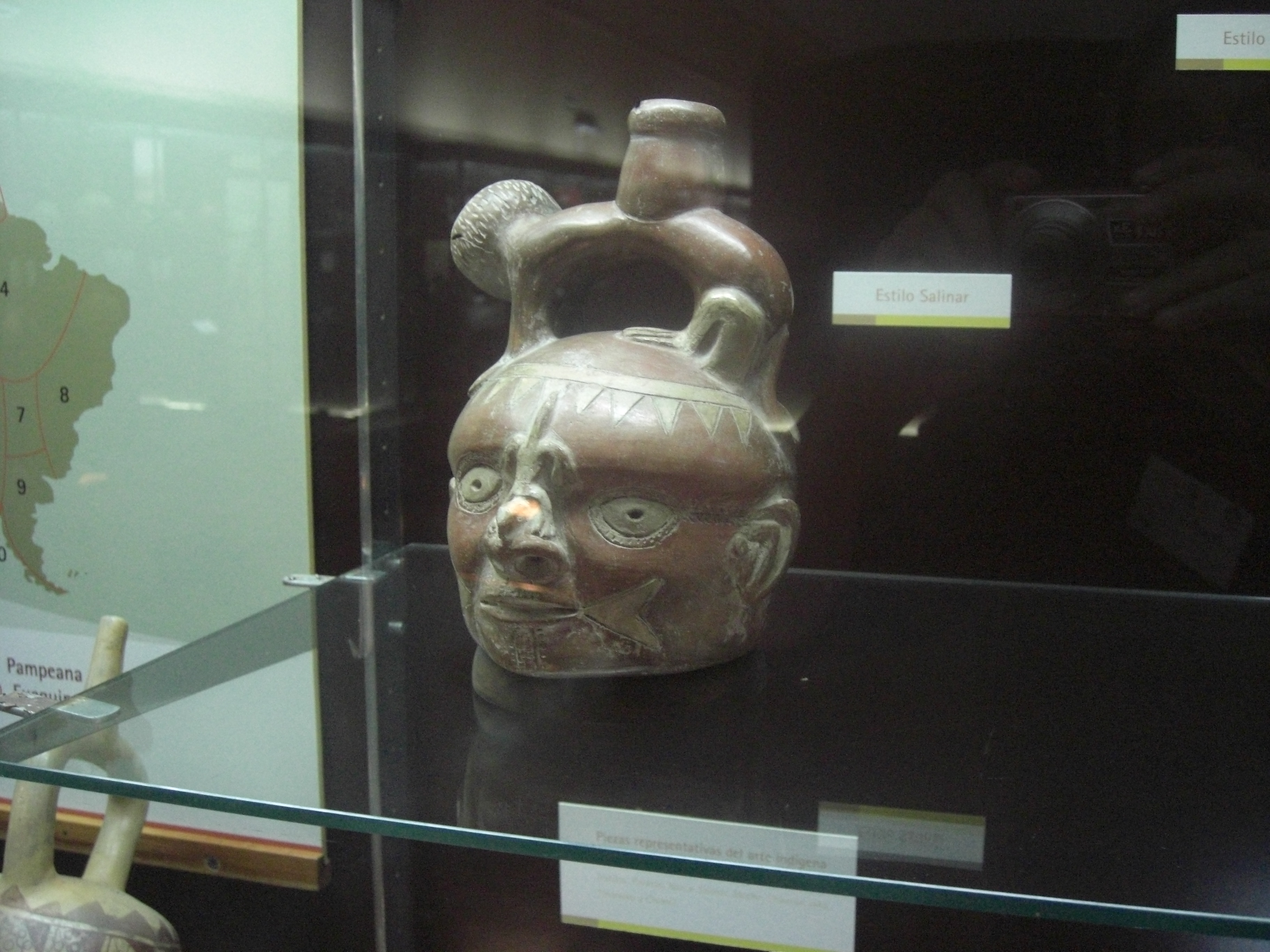 Alfarería estilo Salinar.Sala de etnografía dedicada a las culturas que se desarrollaron fuera del actual territorio de la Argentina. Museo de La Plata